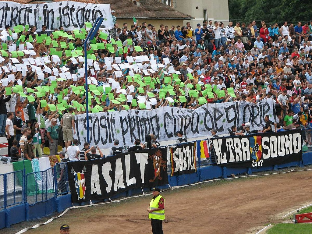 Galeria Vointei Sibiu pe stadionului Municipal din Sibiu la meciul Vointa Sibiu - Steaua, 1-1, 23 iulie 2011